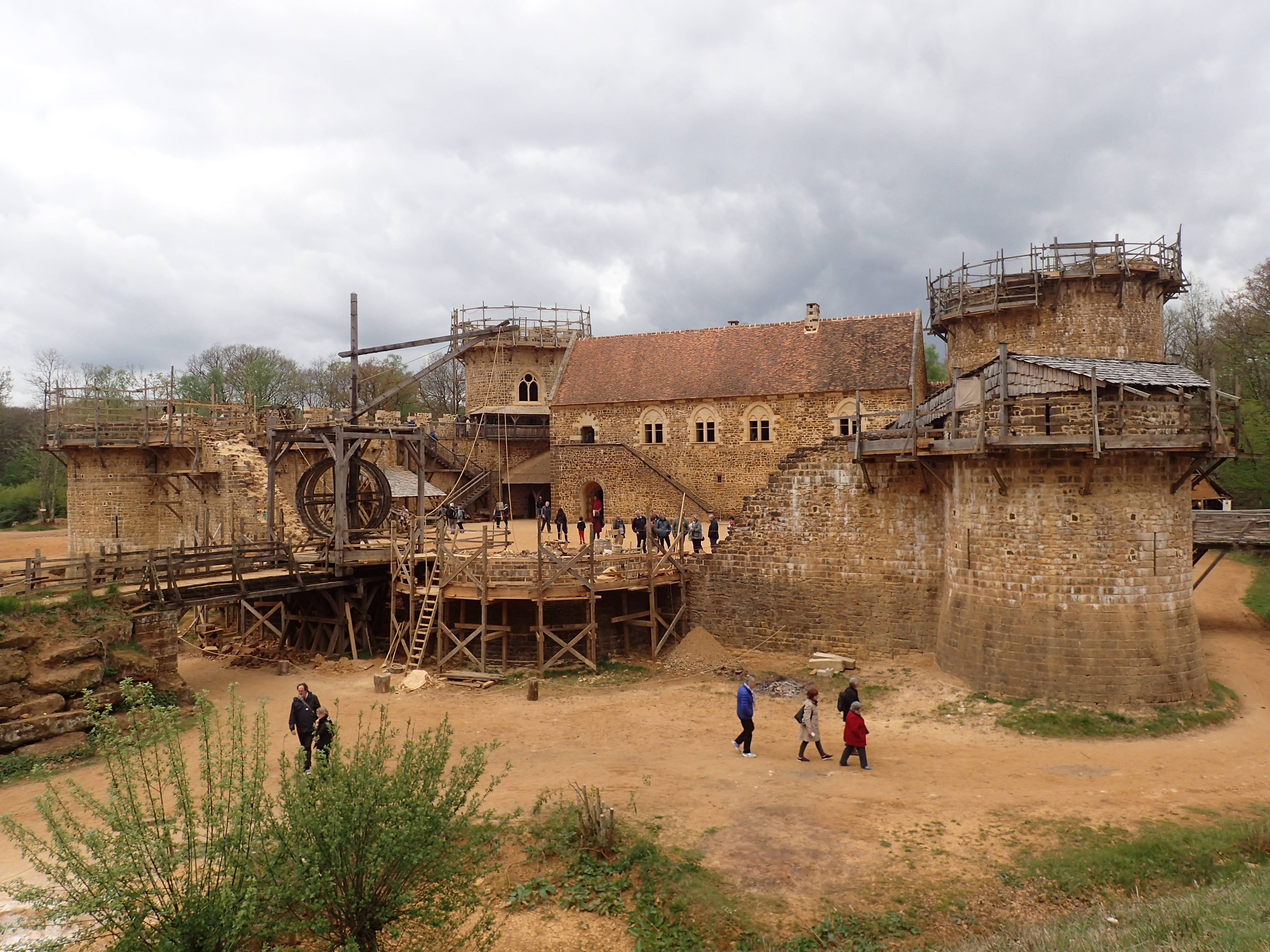 Guédelon, en 2017.